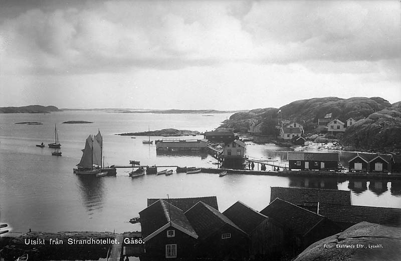 Utsikt från Strandhotellet. Motiv: Gåsö Nyckelord: Riksintressen Kategori: Kust- och skärgårdsmiljöUtsikt från Strandhotellet.